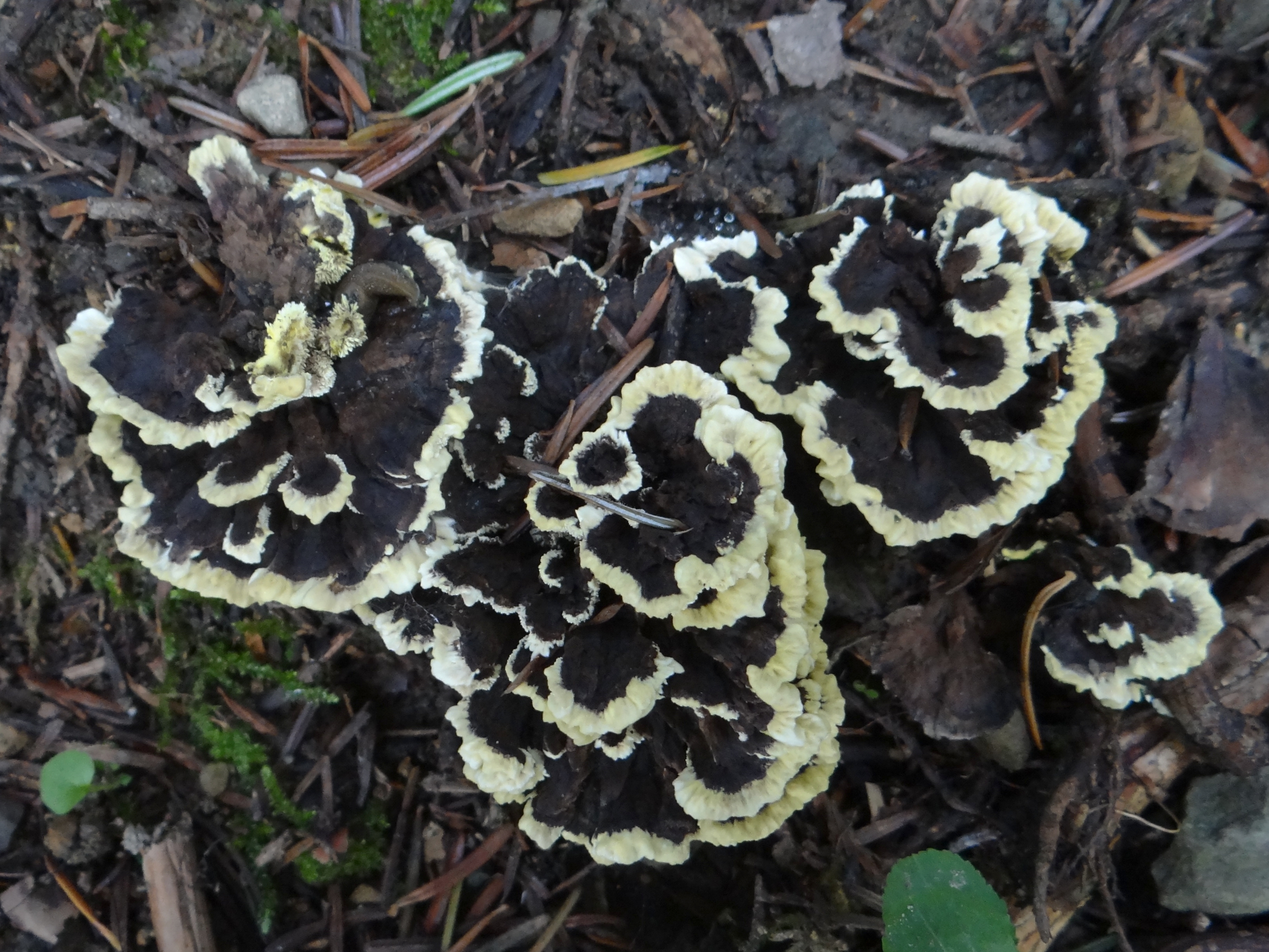 Hydnellum geogenium (location: Poland, Zawoja-Markowa, Babiogórski Park Narodowy)